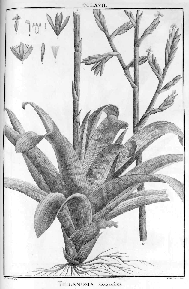 Tillandsia maculata